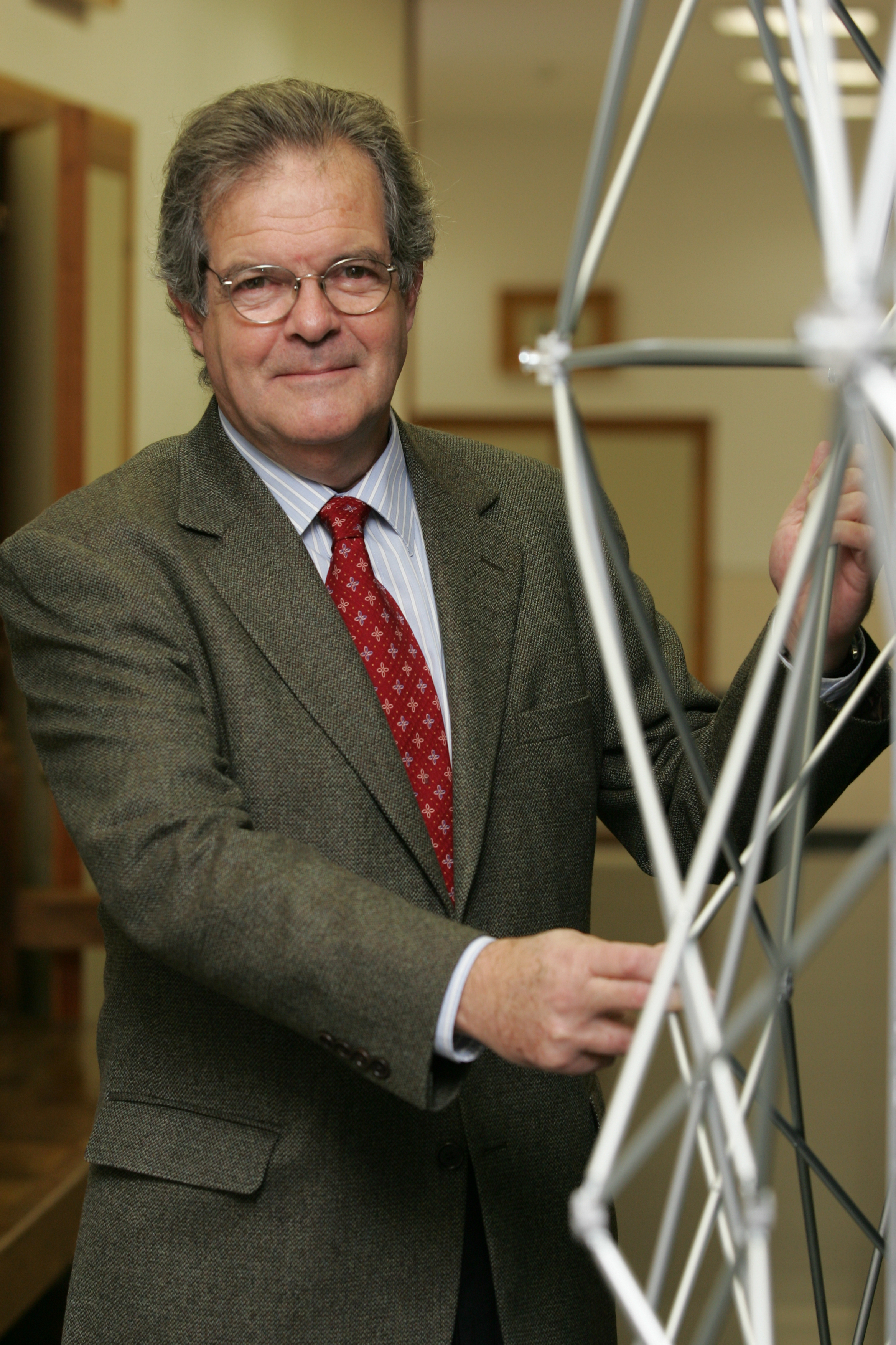 Economista español